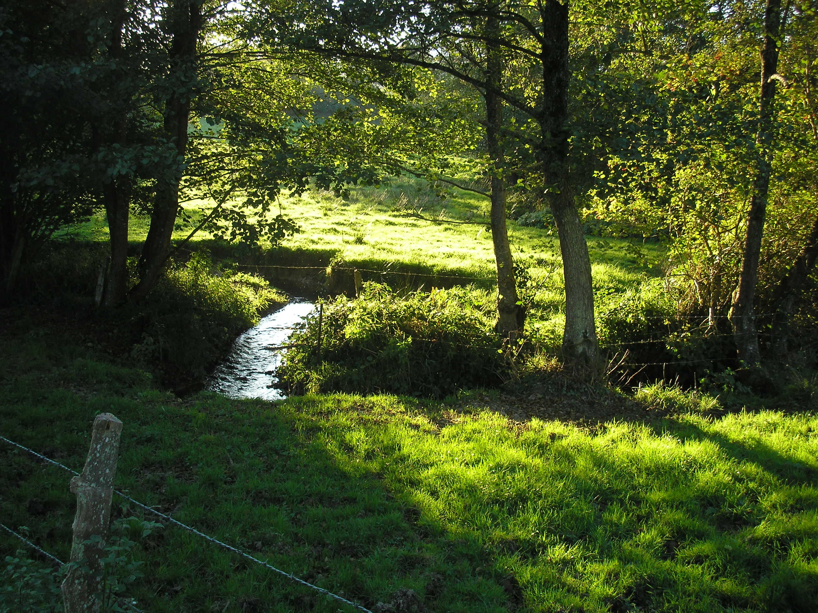 L'Odon entre les communes de La Bigne, au premier plan, et Jurques, au second plan (Normandie, France).